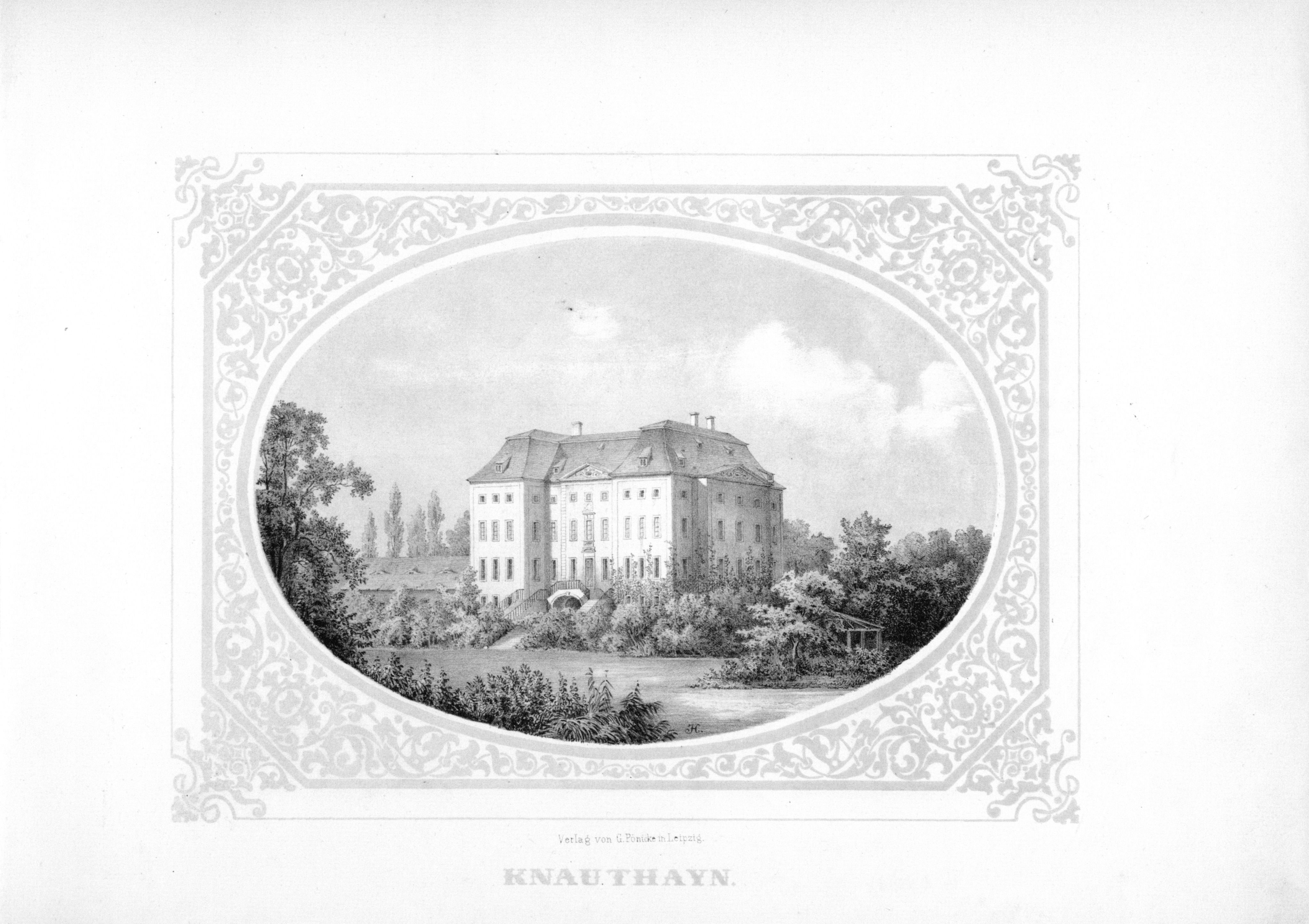 Knauthain aus: Album der Rittergüter und Schlösser im Königreiche Sachsen Leipziger Kreis Section: I